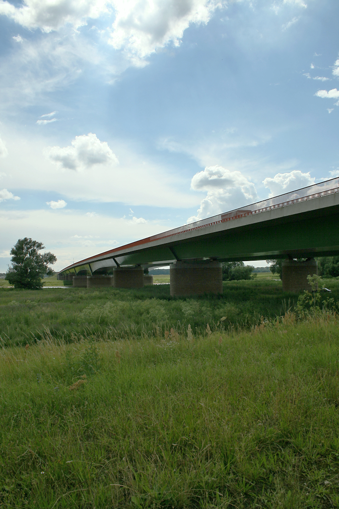 Autobahnbrücke A9 bei Dessau